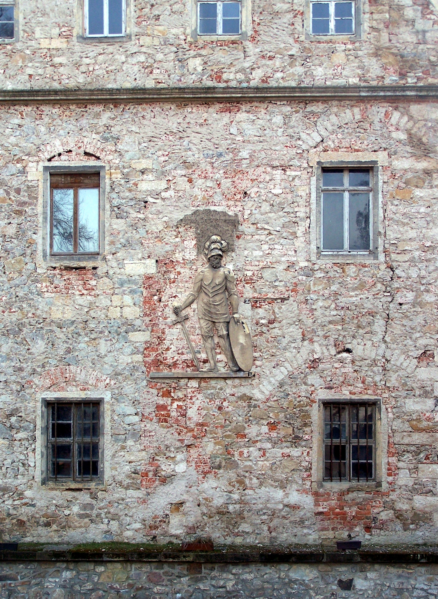 Schloss Oberau, Gemeinde Niederau, Landkreis Meißen